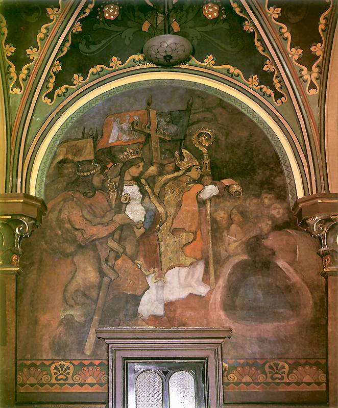 Włodzimierz Tetmajer